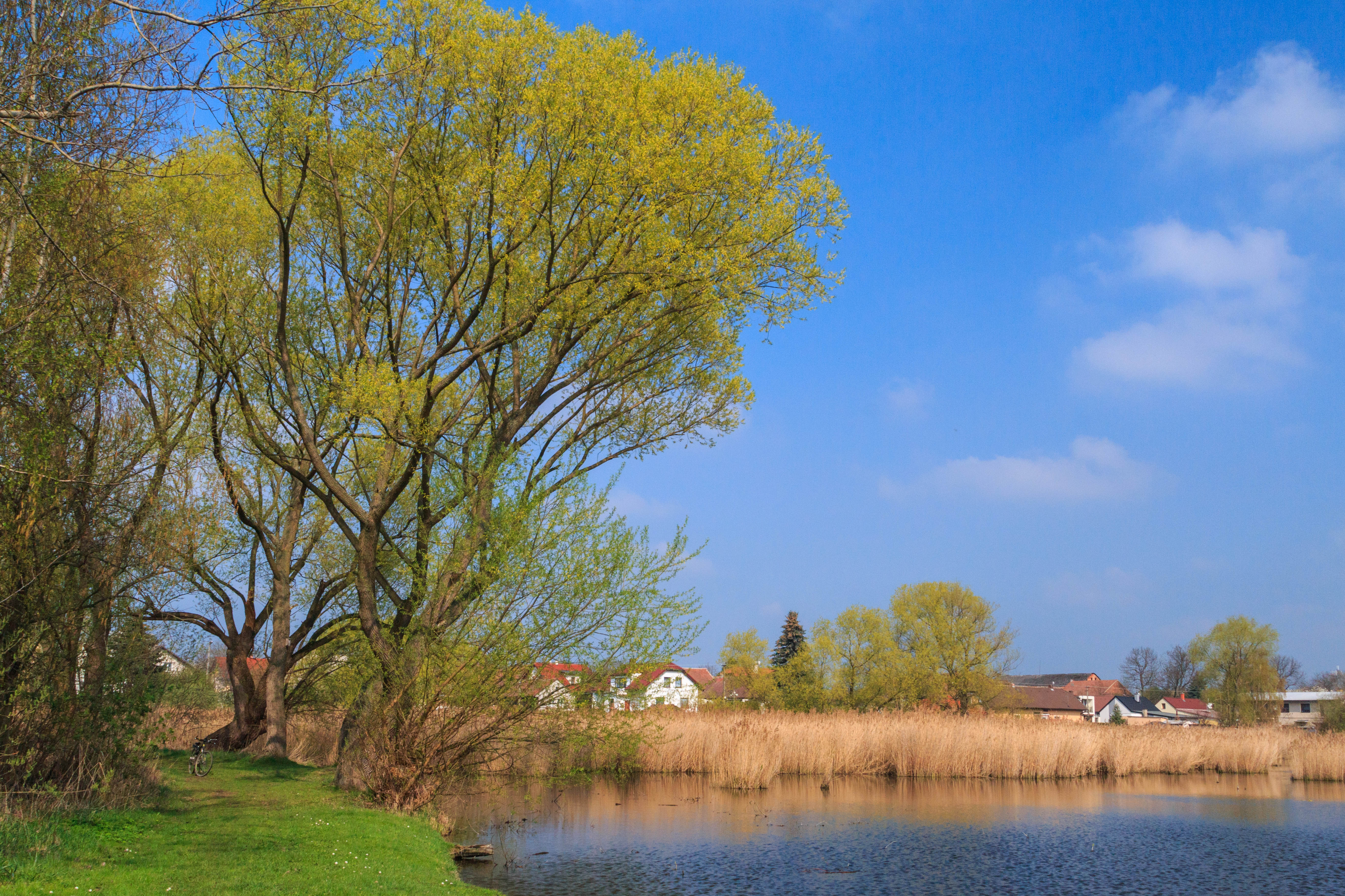 Libišanský rybník Project: Vodstvo.